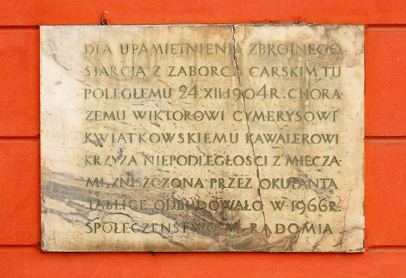 Tablica poświęcona Wiktorowi Cymerys-Kwiatkowskiemu działaczowi OB PPS w Radomiu